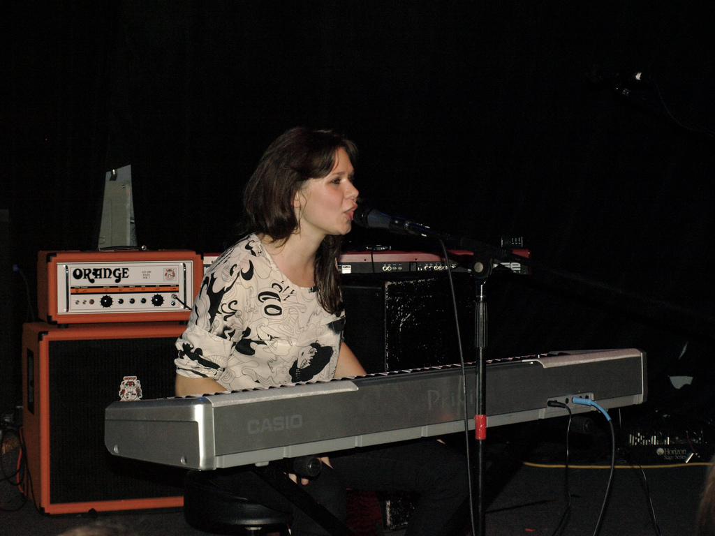 Amy Kuney